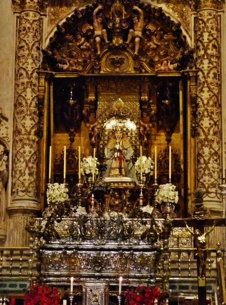 El rey Fernando III de Castilla, apodado el Santo († 1252), que era hijo del rey Alfonso IX de León y de la reina Berenguela de Castilla, fue canonizado en 1671. Y la urna barroca de plata en la que descansa su cuerpo incorrupto, que se halla en la Capilla Real de la catedral de Sevilla y es considerada la obra cumbre de la orfebrería barroca española, fue terminada en el año 1719 y fue realizada por el orfebre gaditano Juan Laureano de Pina, del que también se conservan otras obras en la catedral hispalense.